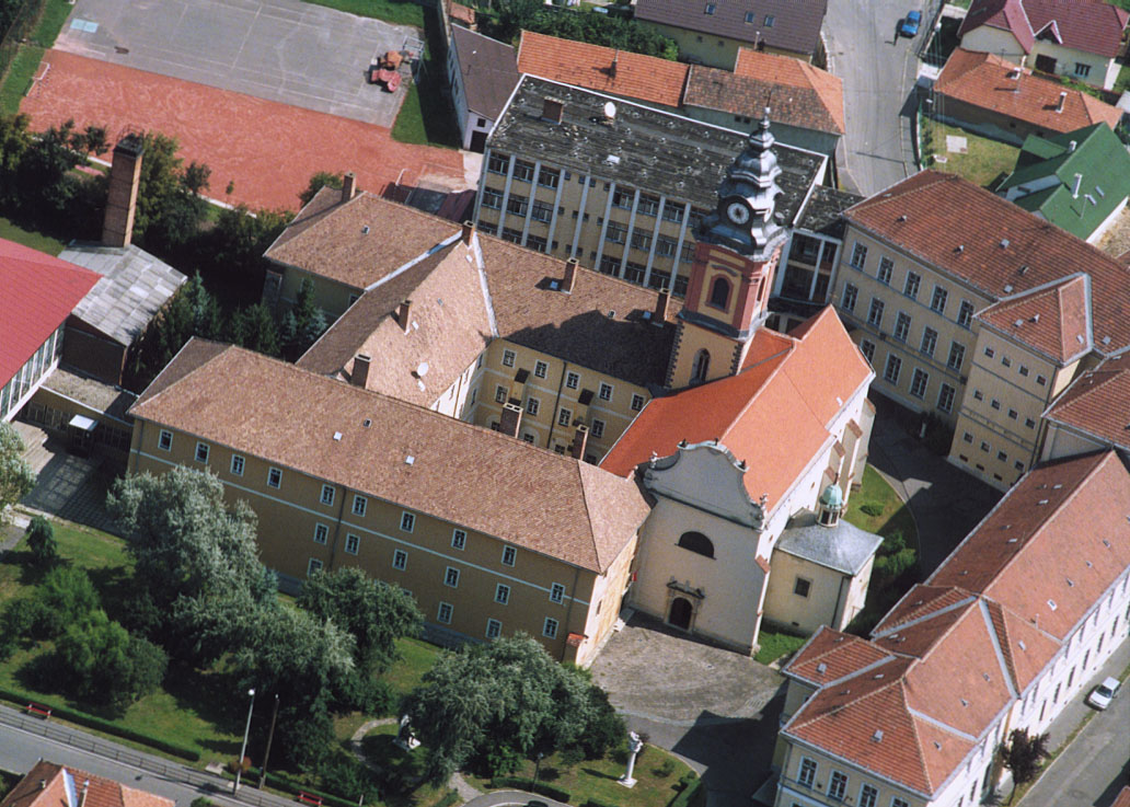 Pálos-piarista templom és rendház - Sátoraljaújhely - Hungary - Europe